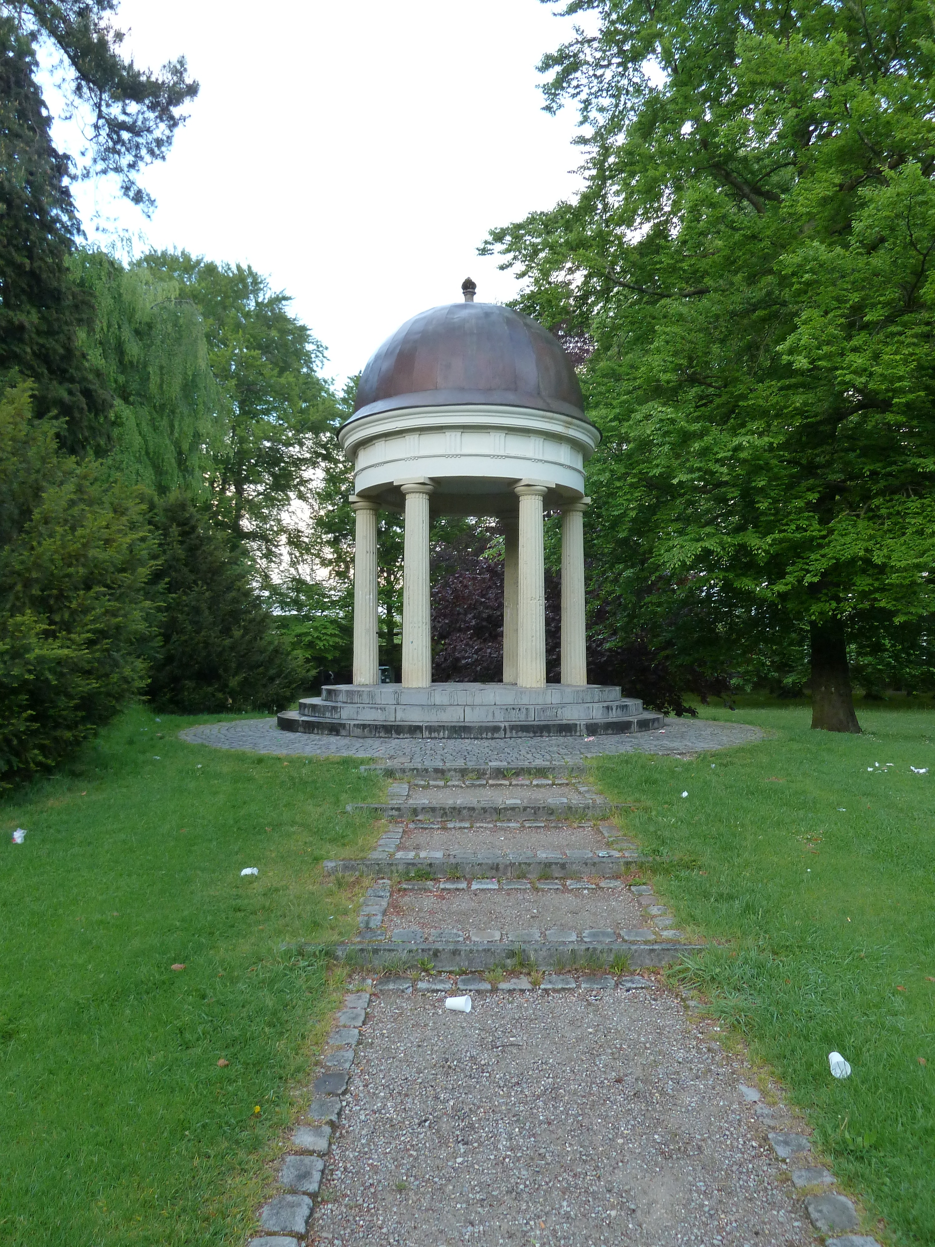 Kaufbeuren Monopterus total